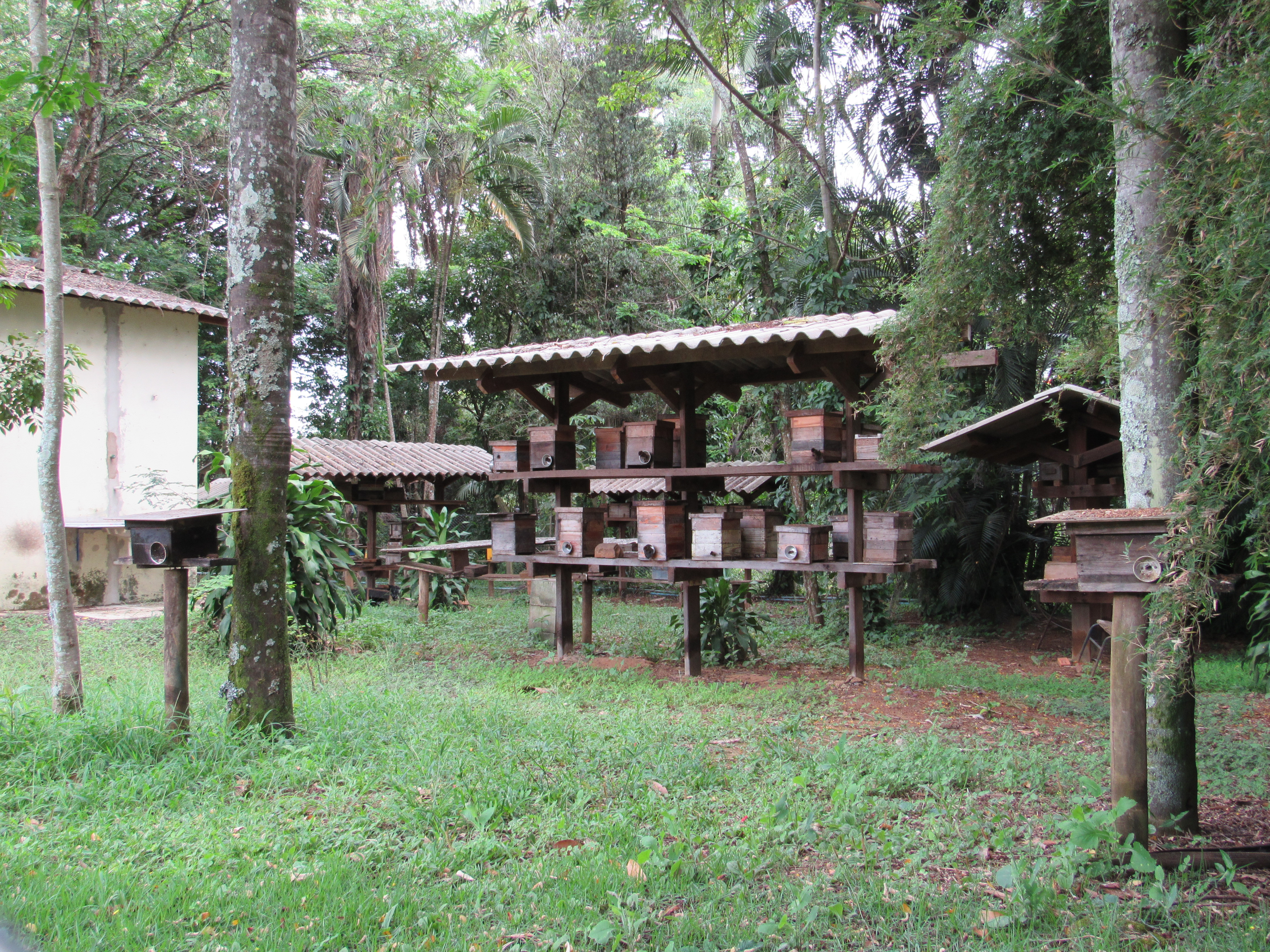 Jardim Zoobotanico de Franca (Meliponário), Franca (SP), Brasil